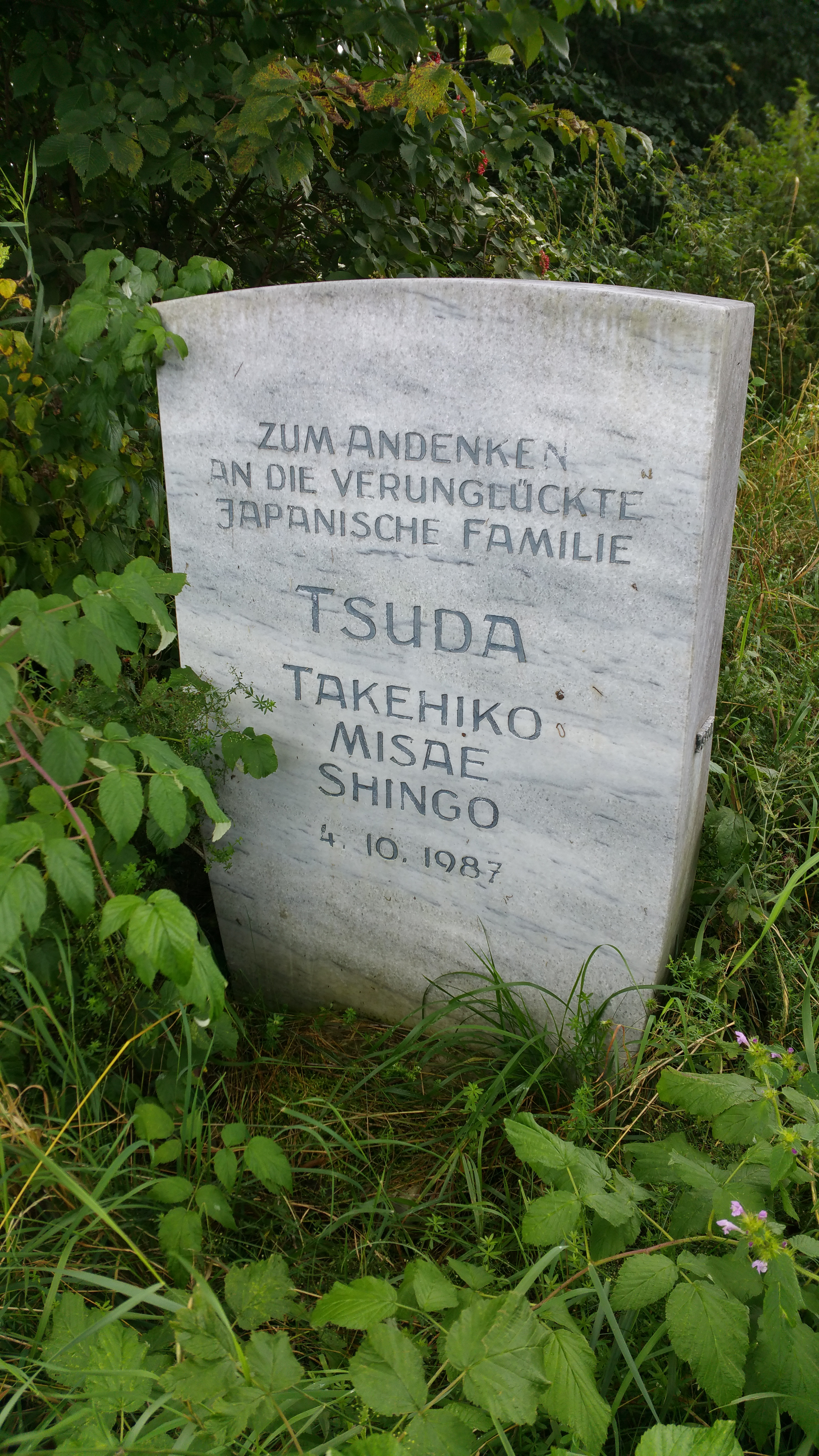 Gedenkstein für die am vierten Oktober 1987 verunglückte japanische Familie Tsuda an der Bundesstrasse 17 in der Nähe des Gasthof Lustberghof, Gemeinde Denklingen